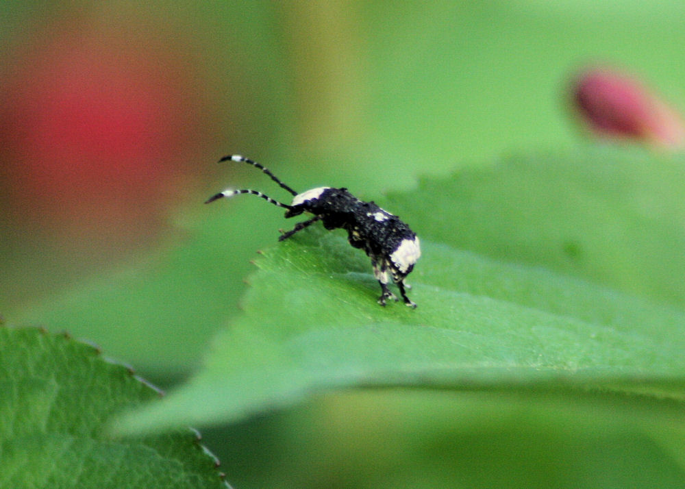 Großer Breitrüssler (Anthribus albinus)